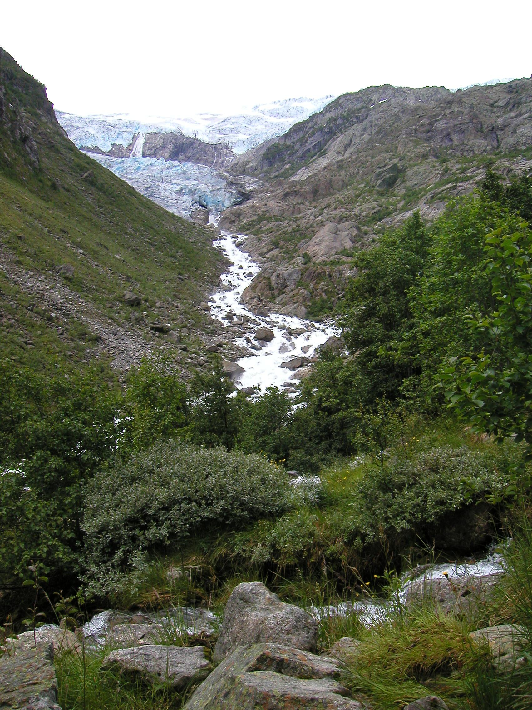 Buerbreen